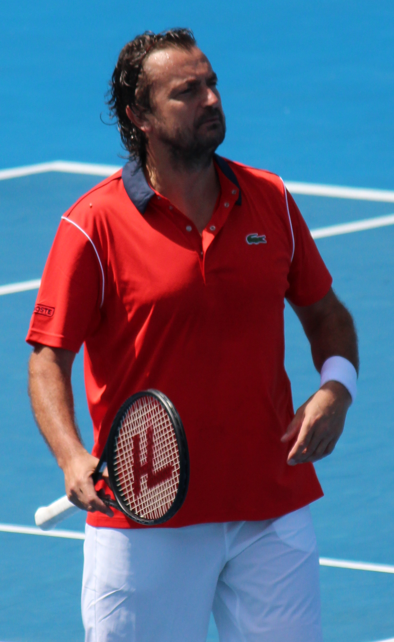 Henri Leconte